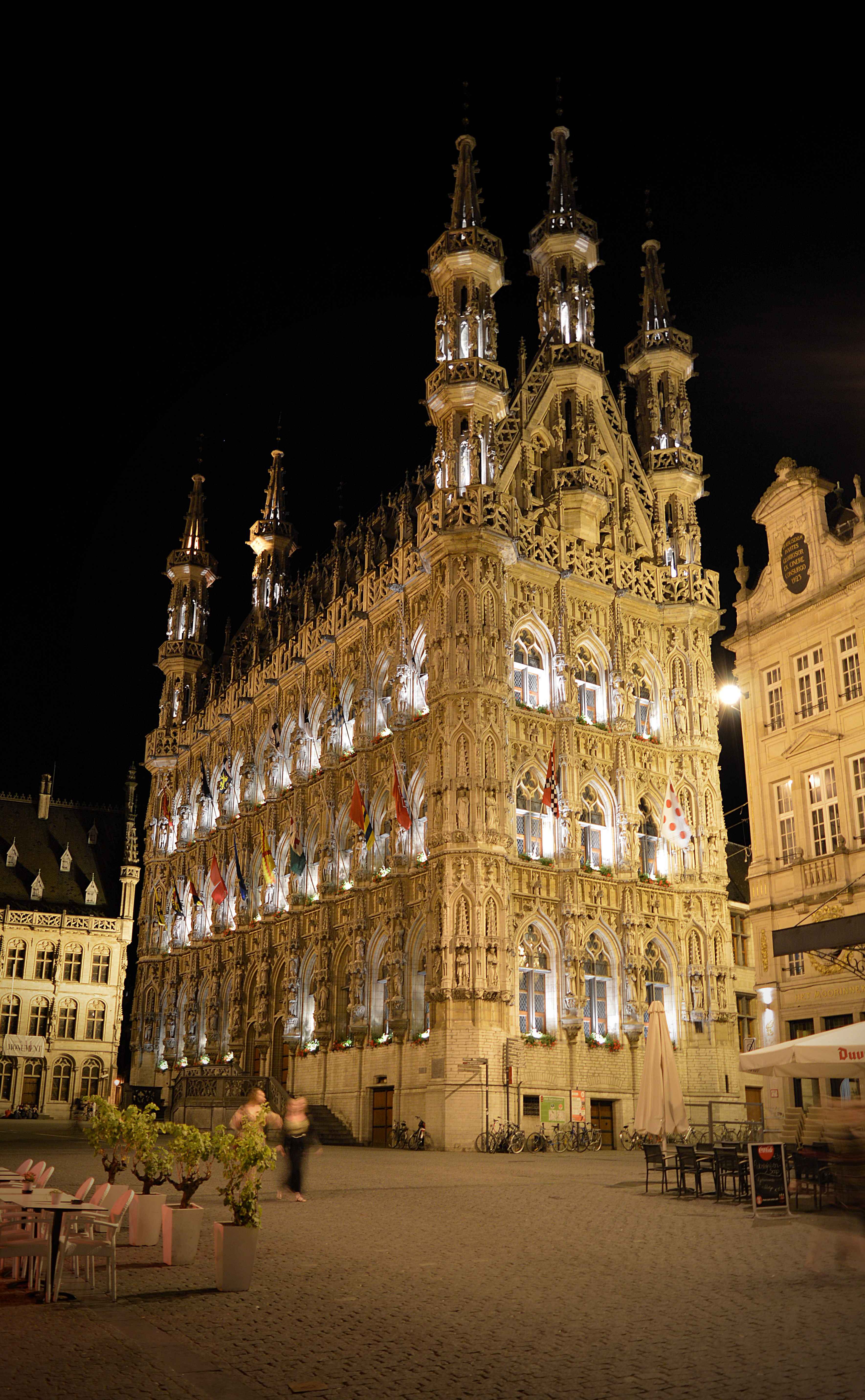 Leuven City Hall